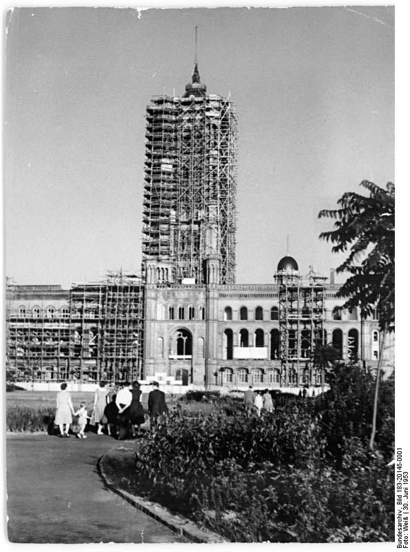 Berlin, Rotes Rathaus, Wiederaufbau Zentralbild Weiß 30.6.1953. 1951 wurde im Auftrag des Magistrats mit dem Wiederaubau des durch anglo-amerikanische Bomben zerstörten Rathauses begonnen. In Kürze wird der Richtkranz auf dem wiederhergestellten Gebäude stehen. UBz: Blick auf das Rathaus